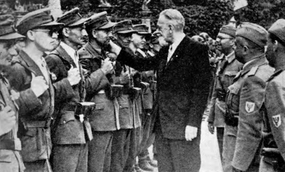 Lev Rupnik in njegovi domobranci